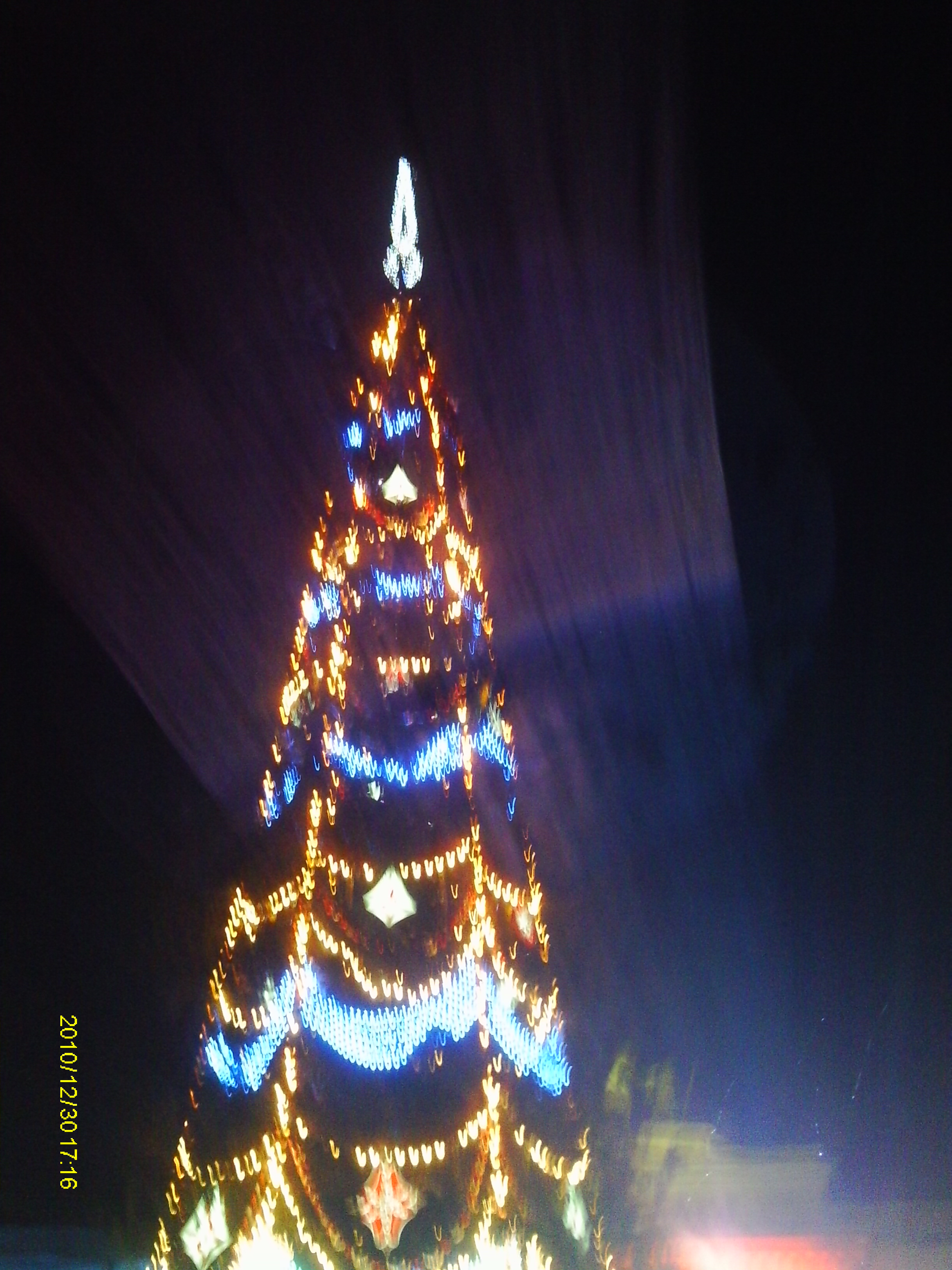 Новогодняя ёлка на Дворцовой площади (30.12.2010)